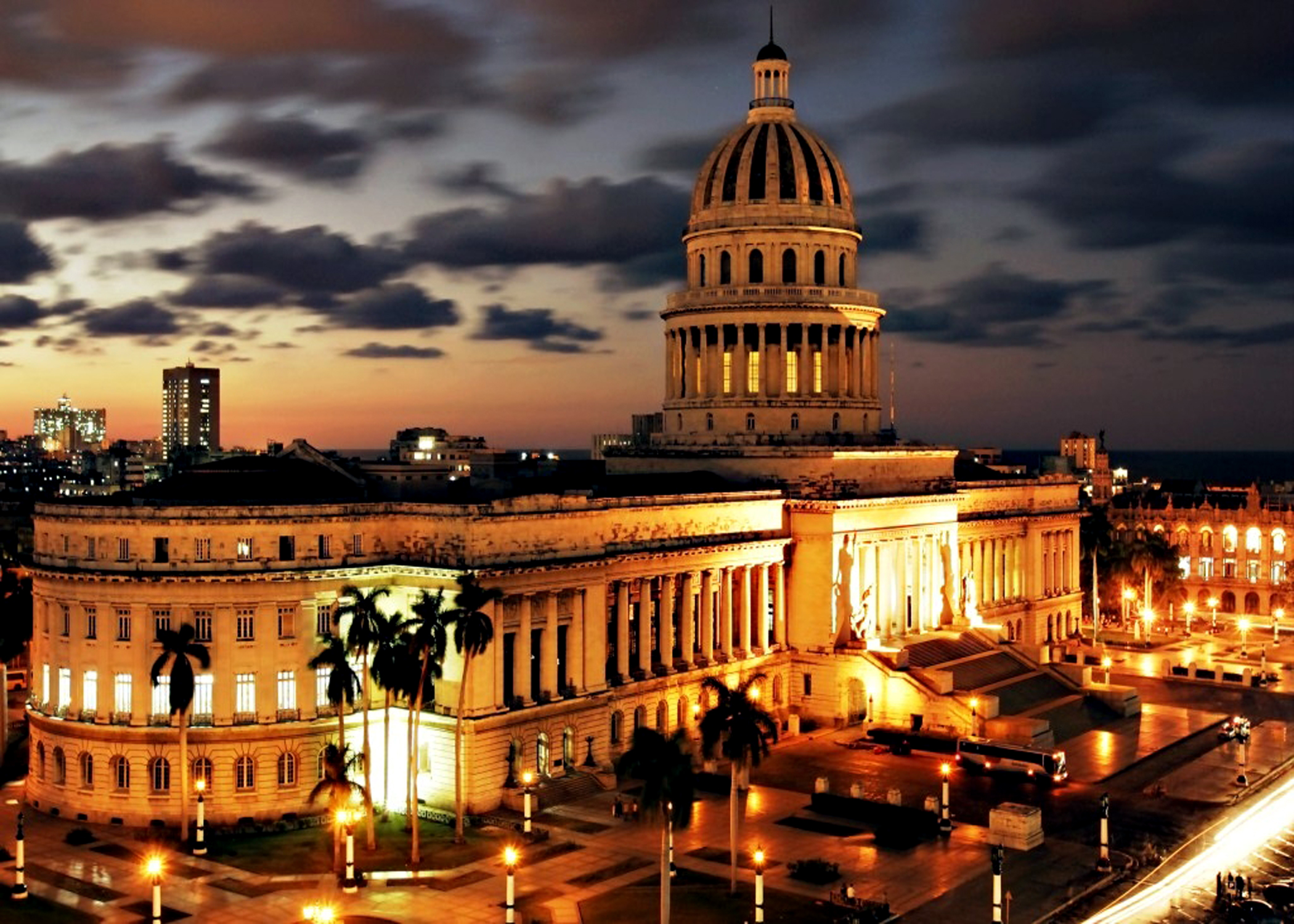 Es una foto del Capitolio de La Habana cuando es de noche.